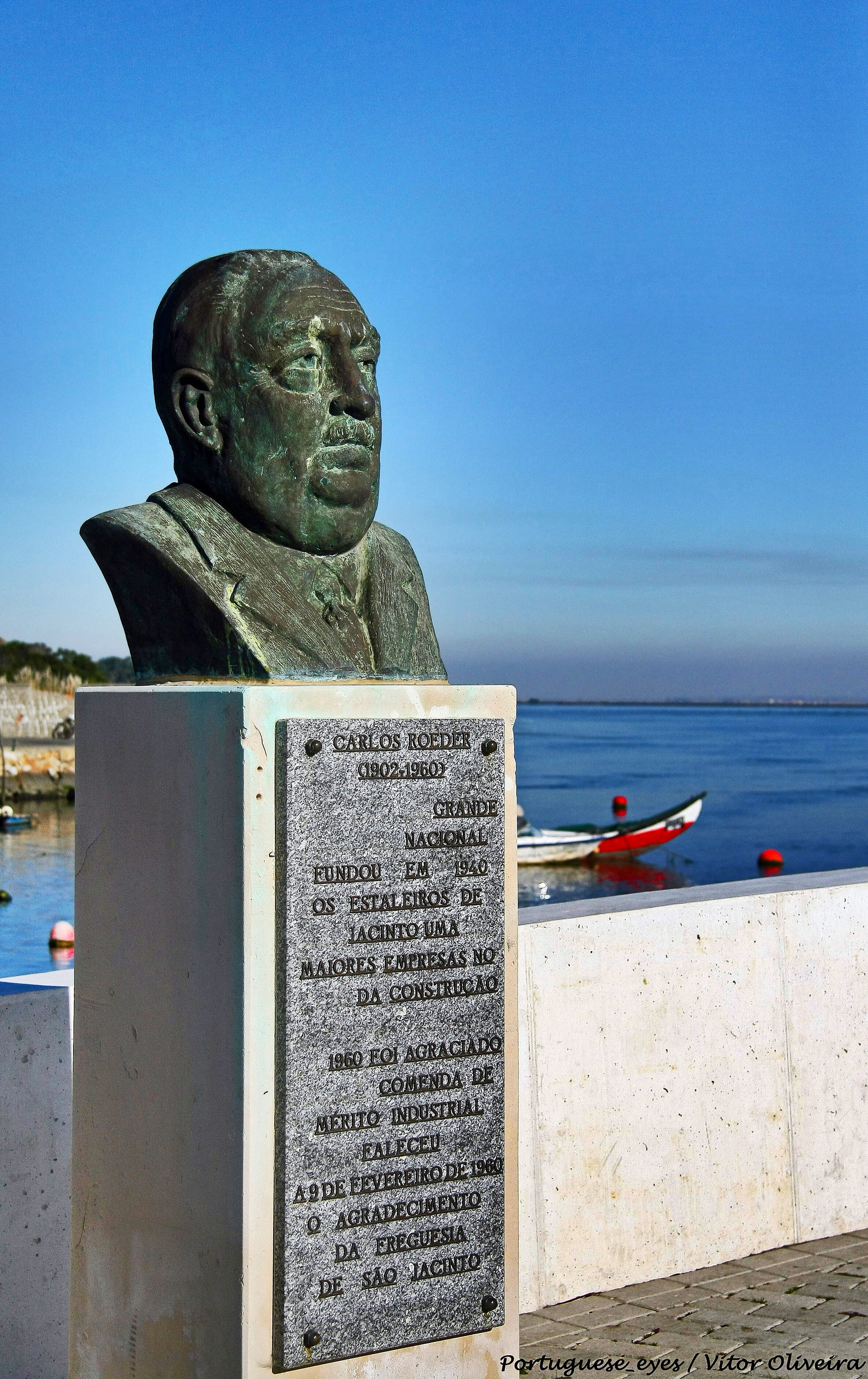 Monumento a Carlos Roeder - São Jacinto - Portugal 🇵🇹